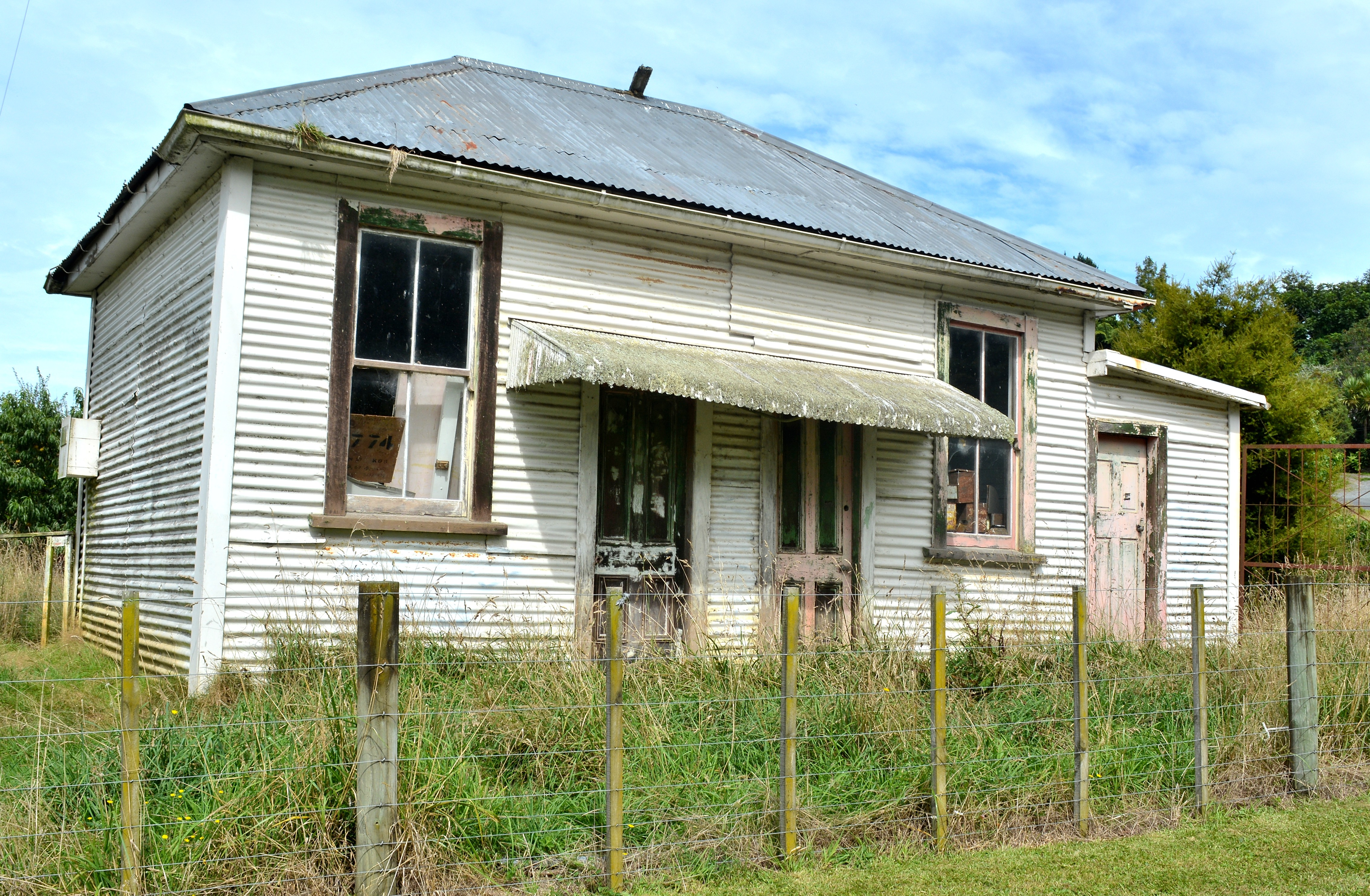 At Glen Massey,New Zealand